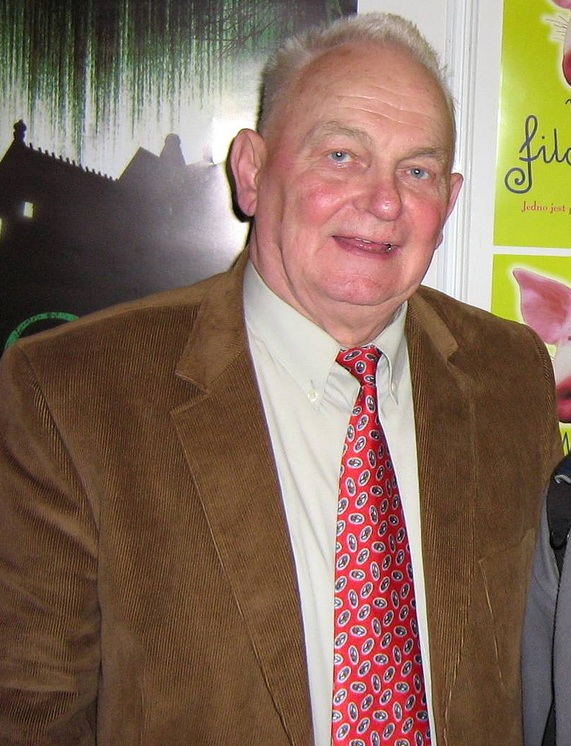 Bogdan Tuszyński (ur. 4 lipca 1932 w Łodzi) - polski dziennikarz sportowy, sprawozdawca Polskiego Radia, historyk prasy i sportu.